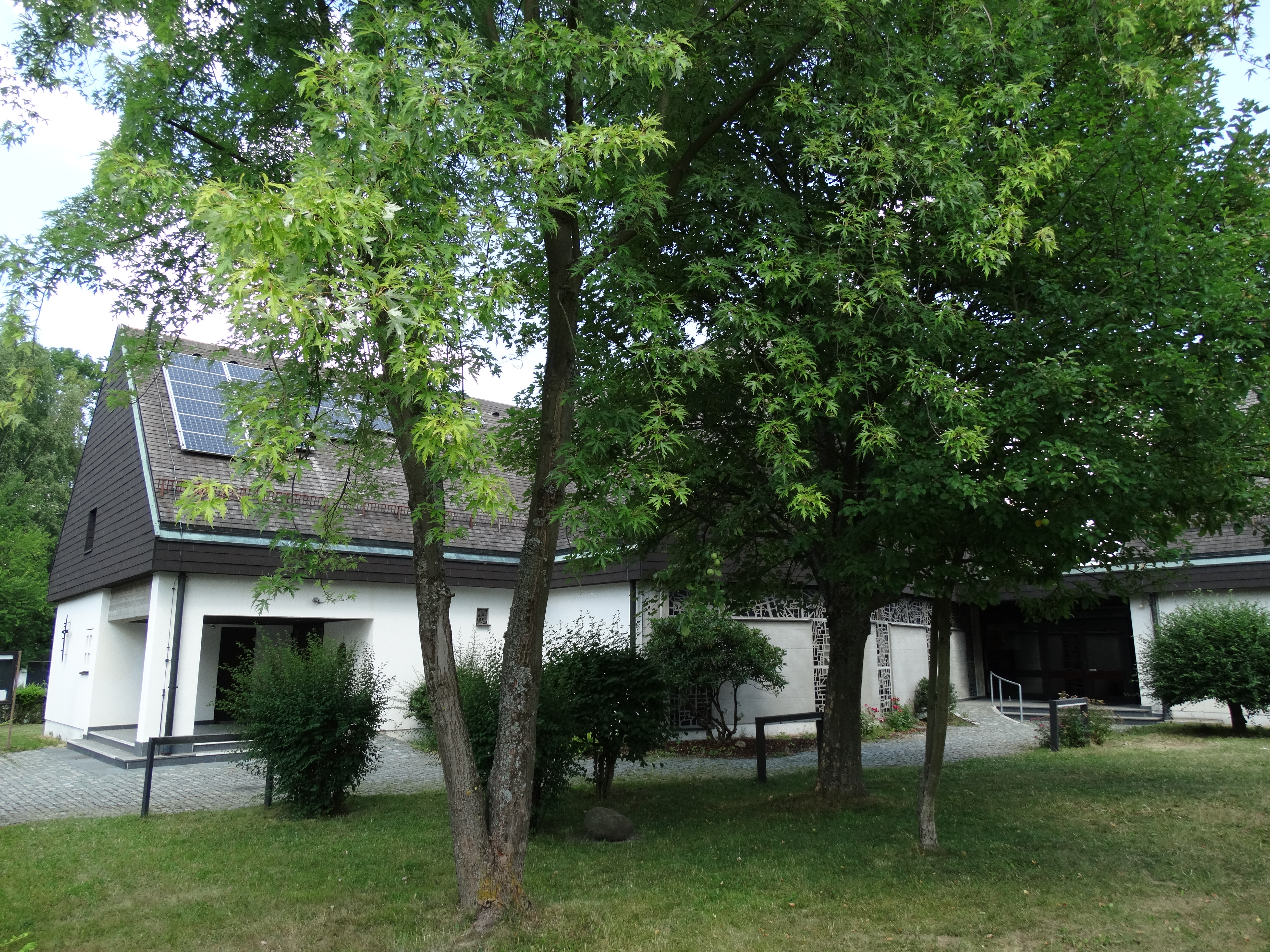 St. Piuskirche in Hof, Außenansicht